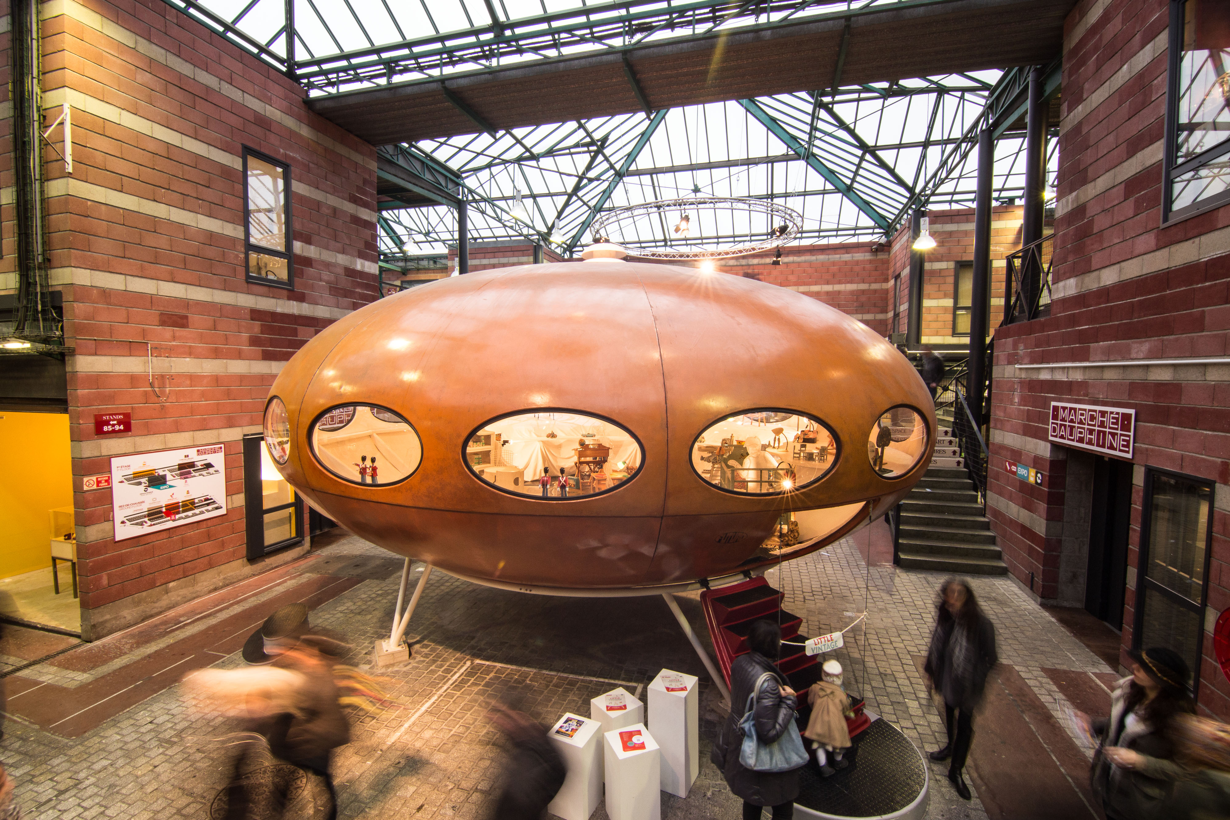 La maison Futuro de Matti Suuronen. Années 60/70.